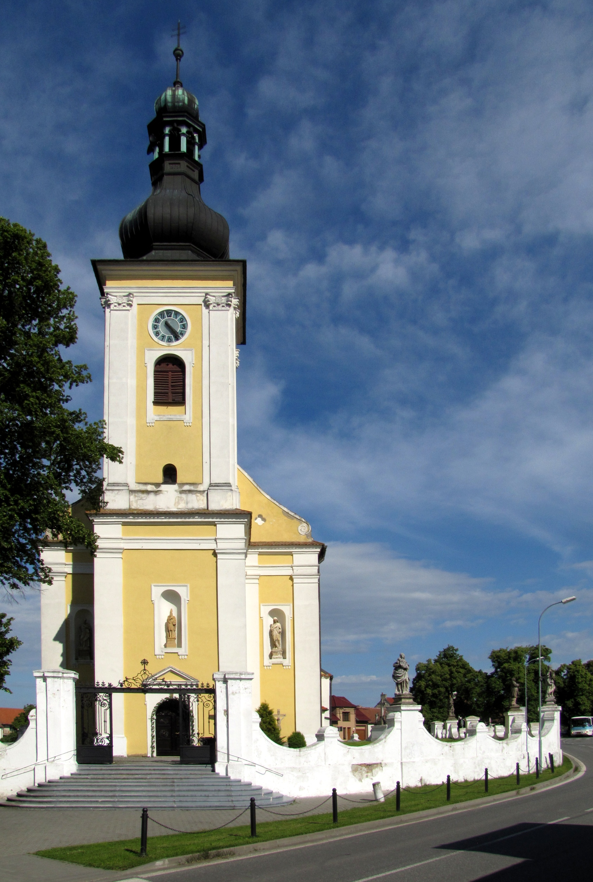 Barokní kostel Všech svatých v Miloticích, okres Hodonín